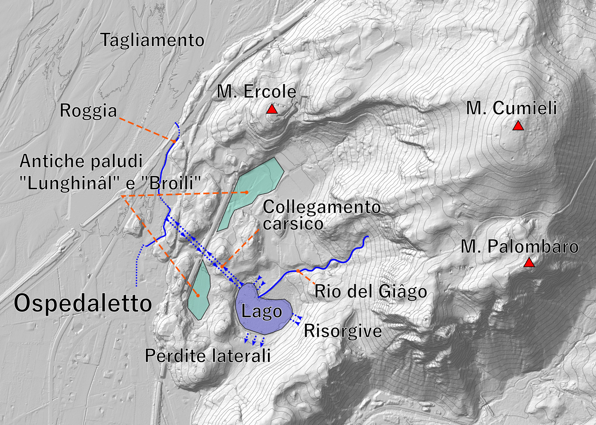 Idrografia del lago di Ospedaletto di Gemona del Friuli (UDINE) Italy